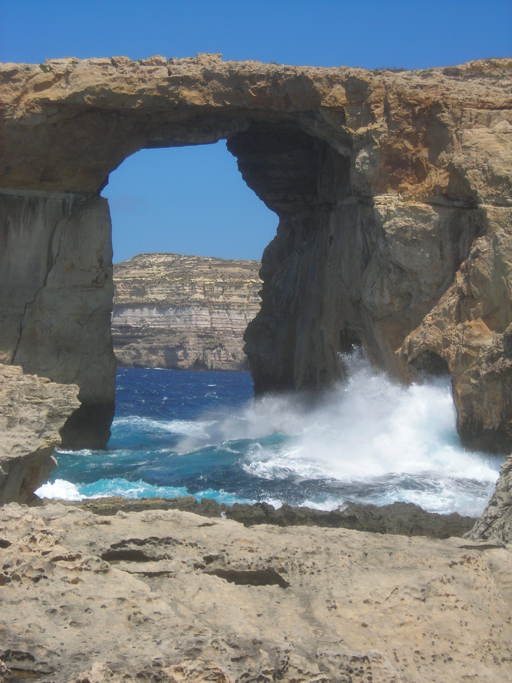 The Azure Window in Djewra, Gozo